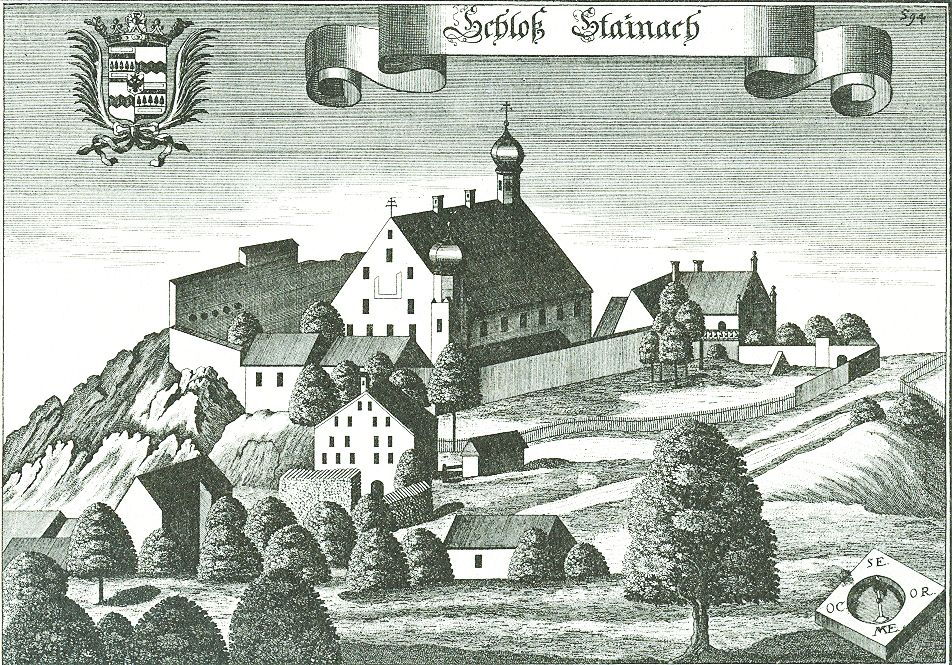 Schloss Steinach (Niederbayern)